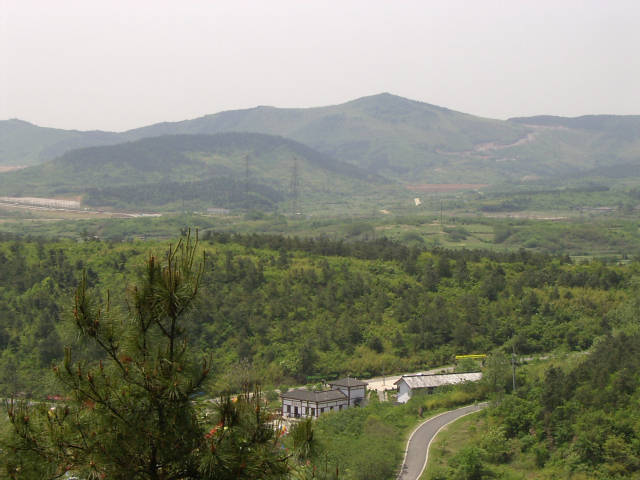 将軍山 将軍山周辺 2004年4月24日撮影 撮影者：権作